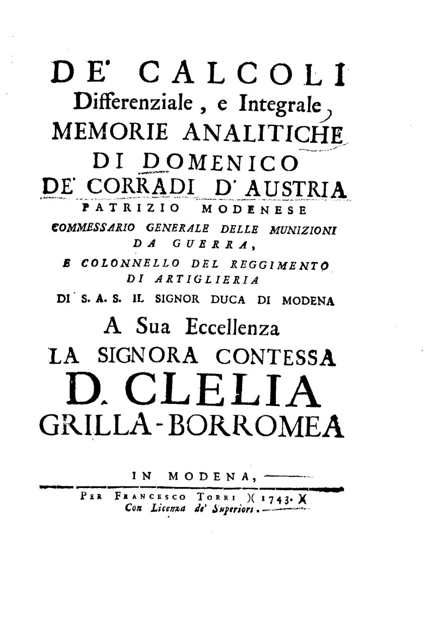 De' calcoli differenziale, e integrale memorie analitiche di Domenico de' Corradi d'Austria …. - In Modena : per Francesco Torri, 1743. - 2 volumi : ill. calcogr. ; 4° .